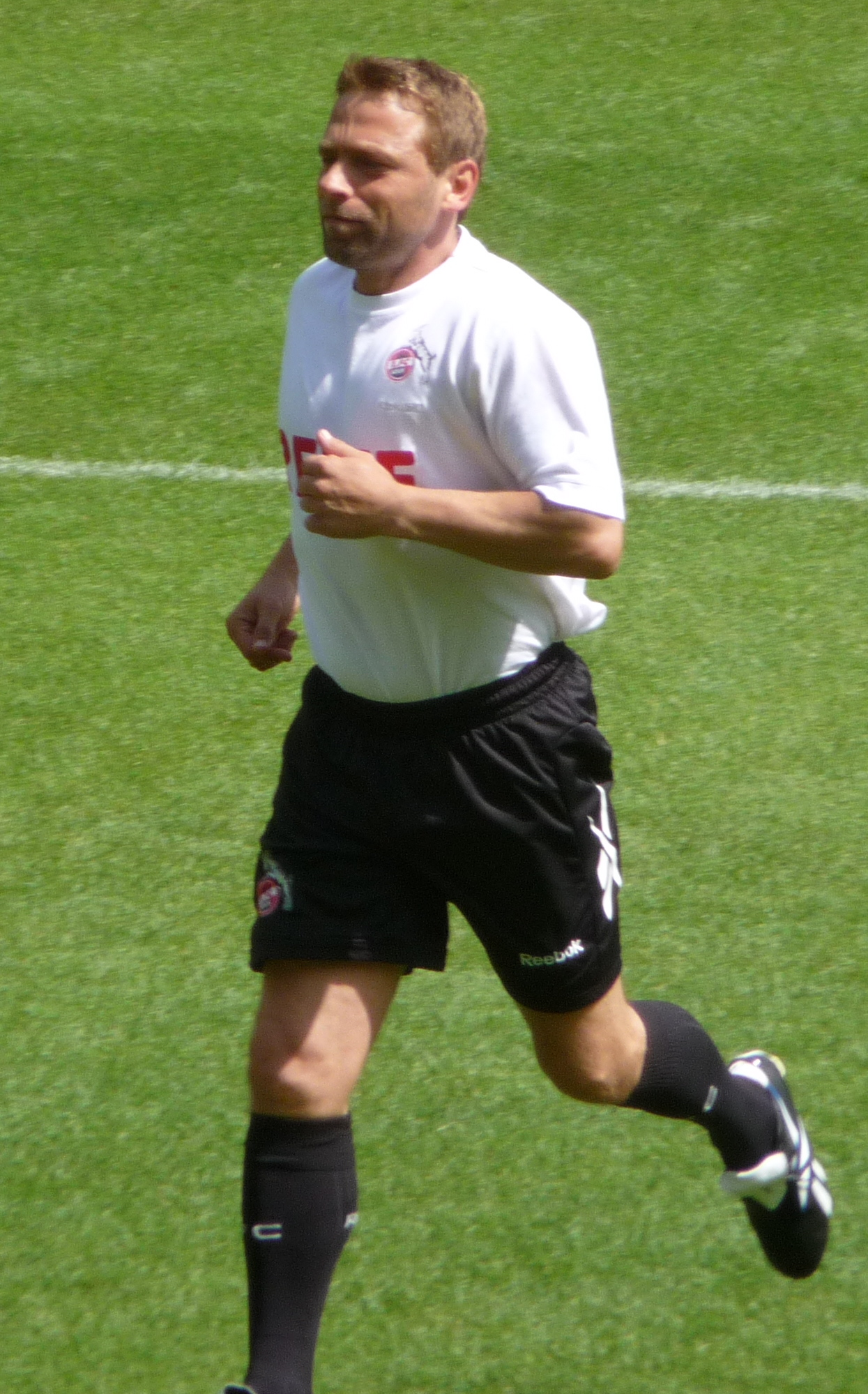 Technik-Trainer Thomas Häßler aufgenommen beim öffentlichen Training des 1. FC Köln